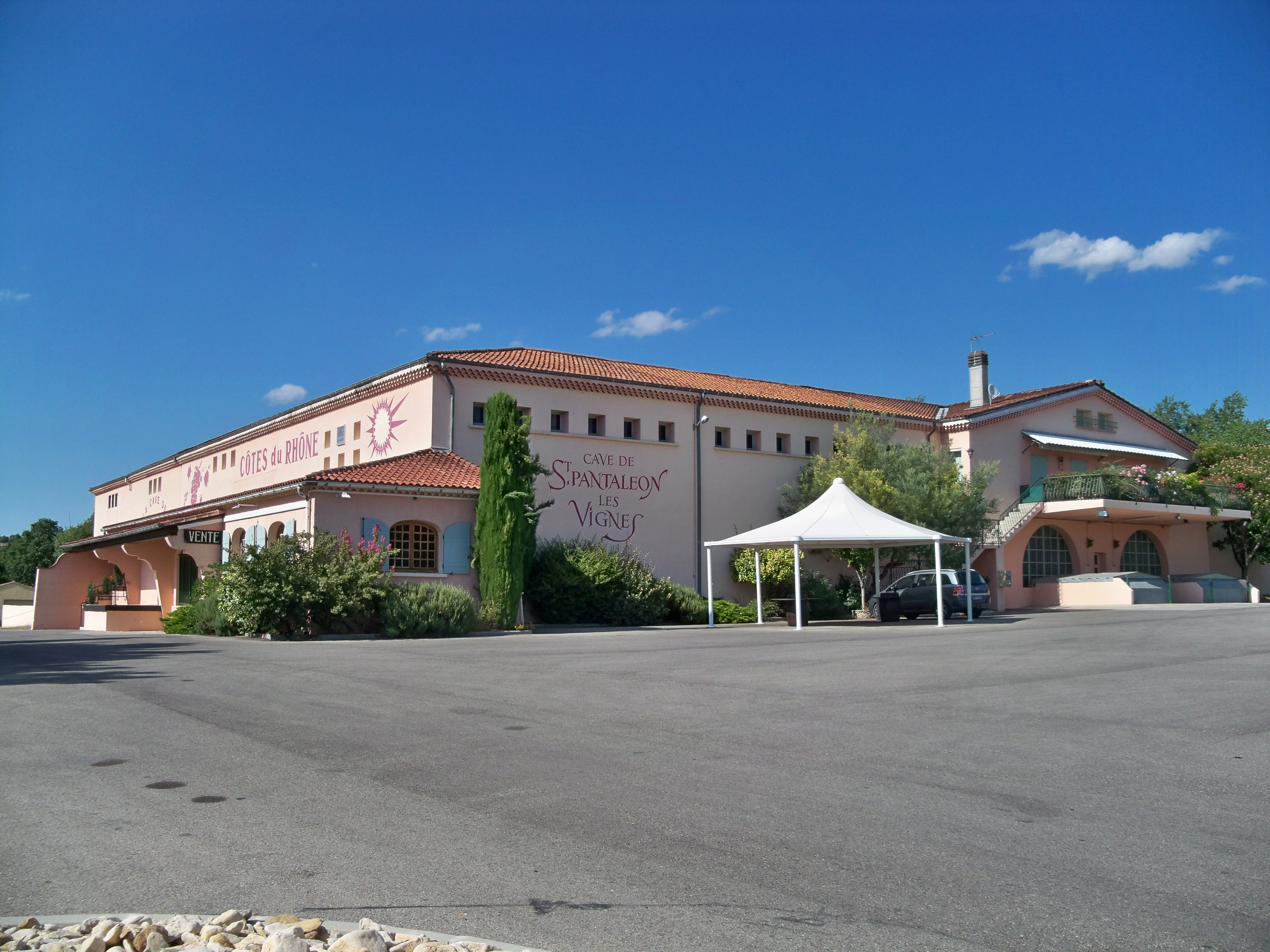 Cave de Saint Pantaléon les Vigne, Drôme, France